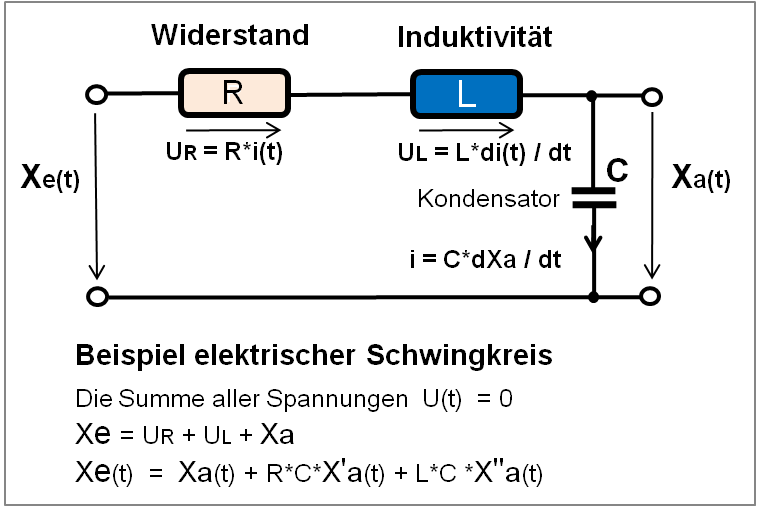 Signalflussplan eines elektrischen Schwingkreises.